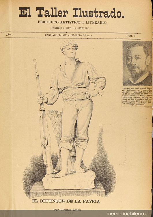 El Taller Ilustrado es un semanario de artes fundado en 1885 por el escultor de arte José Miguel Blanco. Este es su primer número apareció el 6 de julio de 1885.